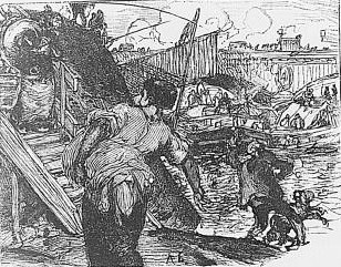 Lavandières parisiennes des bords de Seine (le texte du livre où parait cette illustration précise qu'elles sont à l'époque en voie de disparition pour cause de refus de nouvelles autorisations par la police).